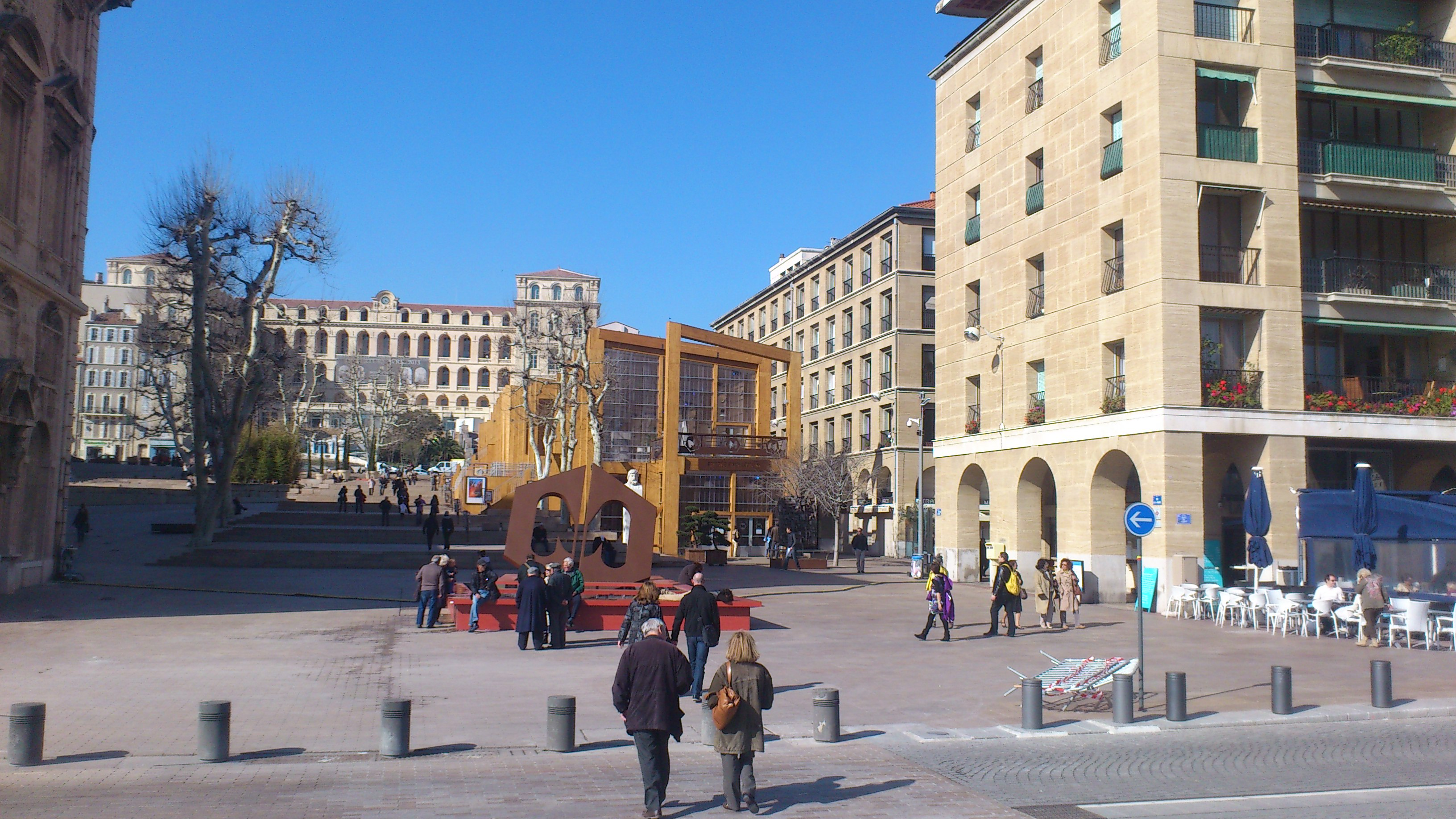 Place Bargemon, Marseille, à l'occasion de MP2013